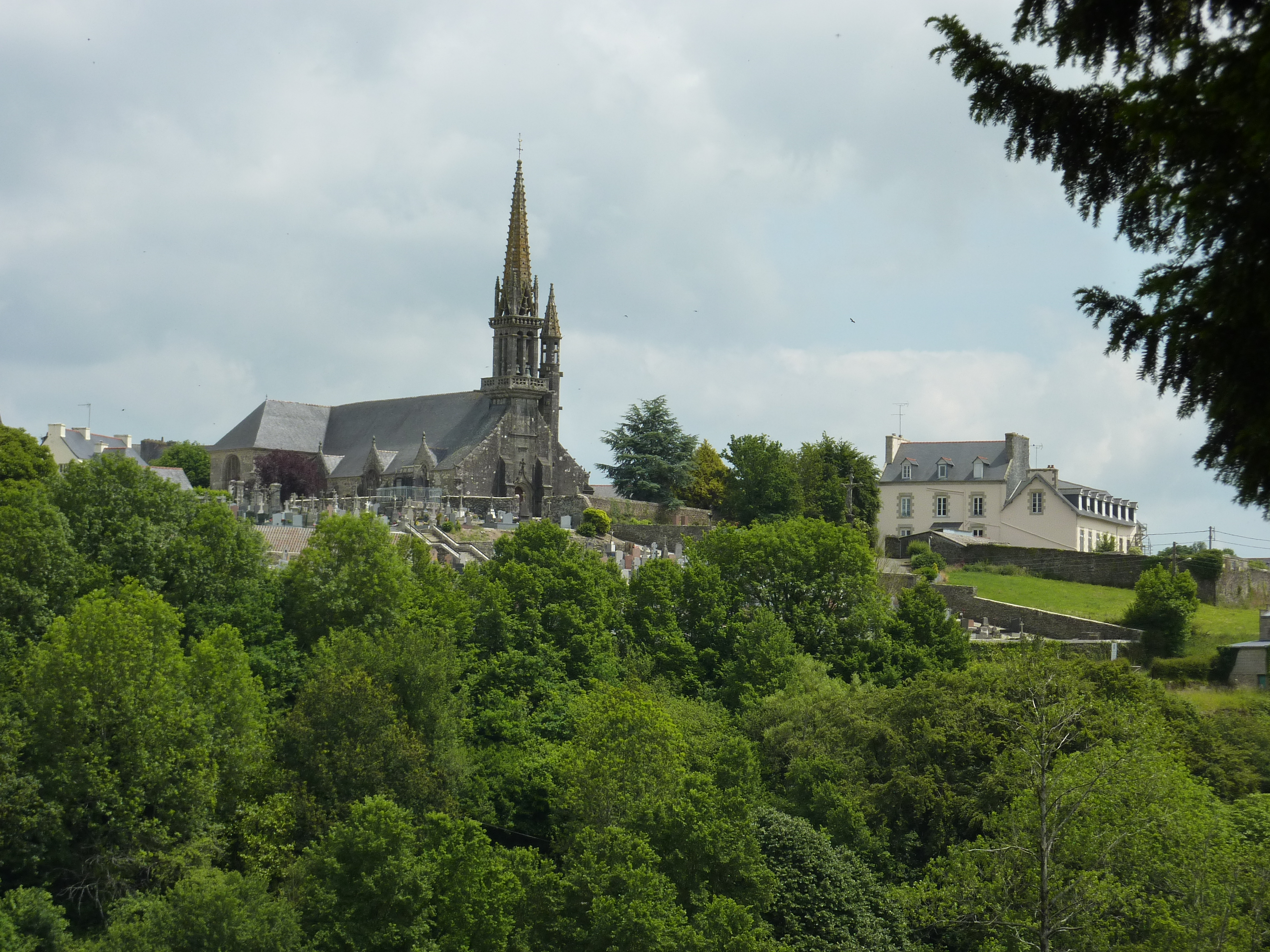 Brasparts sur sa colline [vue depuis la route du Faou]